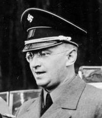 Title: Sudetenland, Besuch Wilhelm Frick Extra information: Staatsbesuch des Reichs- und Preußischen Ministers des Innern Dr. Wilhelm Frick in Süddeutschland (ohne Ortsangaben)Dr. Wilhelm Frick; Adolf von Bomhard; Dr. Konrad Henlein, Gauleiter der NSDAP und Reichskommissar für das sudetendeutsche Gebiet People in the image: Frick, Wilhelm Dr.: NSDAP, MdR, Reichsinnenminister, 1946 hingerichtet, Deutschland * Bomhard, Adolf von: Generalleutnant, Chef der Ordnungspolizei, Bürgermeister Prien am Chiemsee, Deutschland * Henlein, Konrad: Reichskommissar, Gauleiter im Sudetenland, Deutschland Factual corrections and alternative descriptions are encouraged separately from the original description. Additionally errors can be reported at this page to inform the Bundesarchiv. Original historic description: Staatsbesuch des Reichs- und Preußischen Ministers des Innern Dr. Wilhelm Frick in Süeddeutschland Dr. Stuckart, Dr. Frick (2.v.l.), v. Bomhard, Henlein (2.v.r.), Krebs